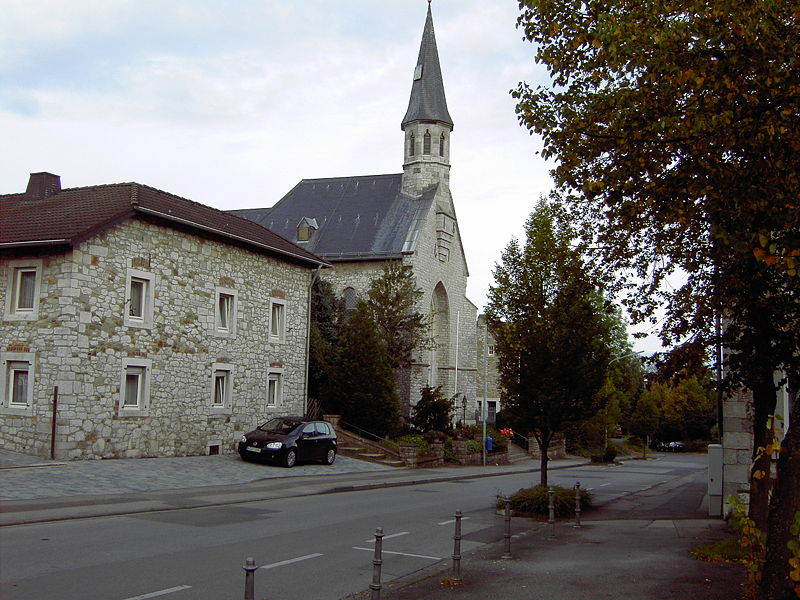 Kirche Maria Empfängnis in Dorff bei Stolberg